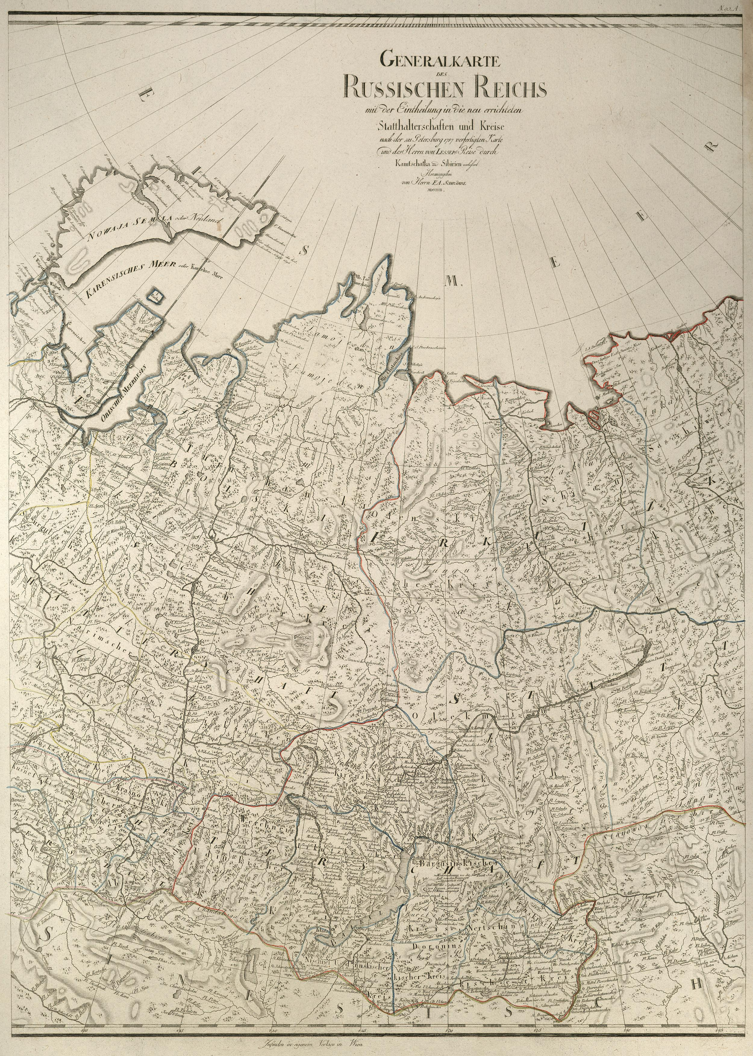 Generalkarte des Russischen Reichs mit der Eintheilung in die neu errichteten Statthalterschaften und Kreise